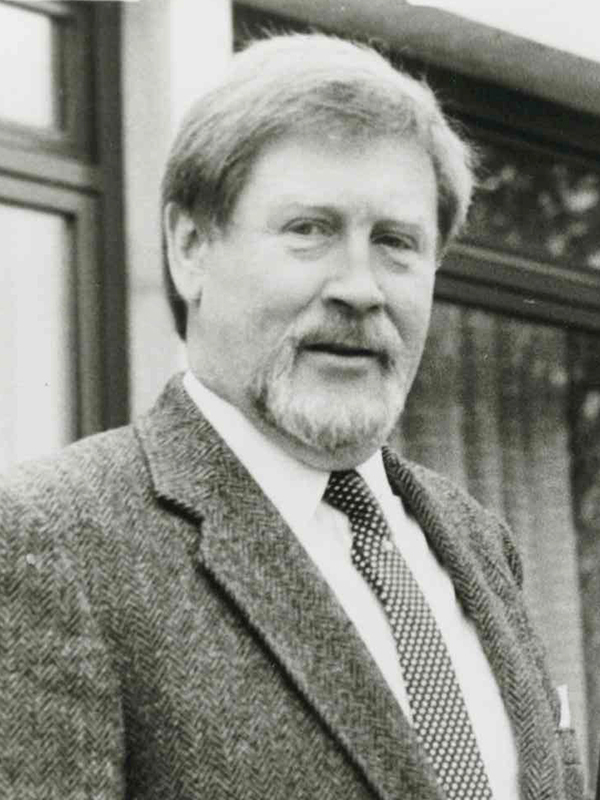 Dieses Foto ist ein Porträt von Hermann Beckmann, das im Jahr 1979 aufgenommen wurde. Beckmann war Mitgründer des Vereins Münchner Altenwohnstift sowie Geschäftsführer aller Wohnstifte von KWA Kuratorium Wohnen im Alter bis zu seinem Eintritt in den Ruhestand im Jahr 1996.